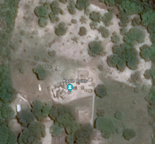 Kiswahili: Hii ni picha ya satelite ya magofu ya Kaole